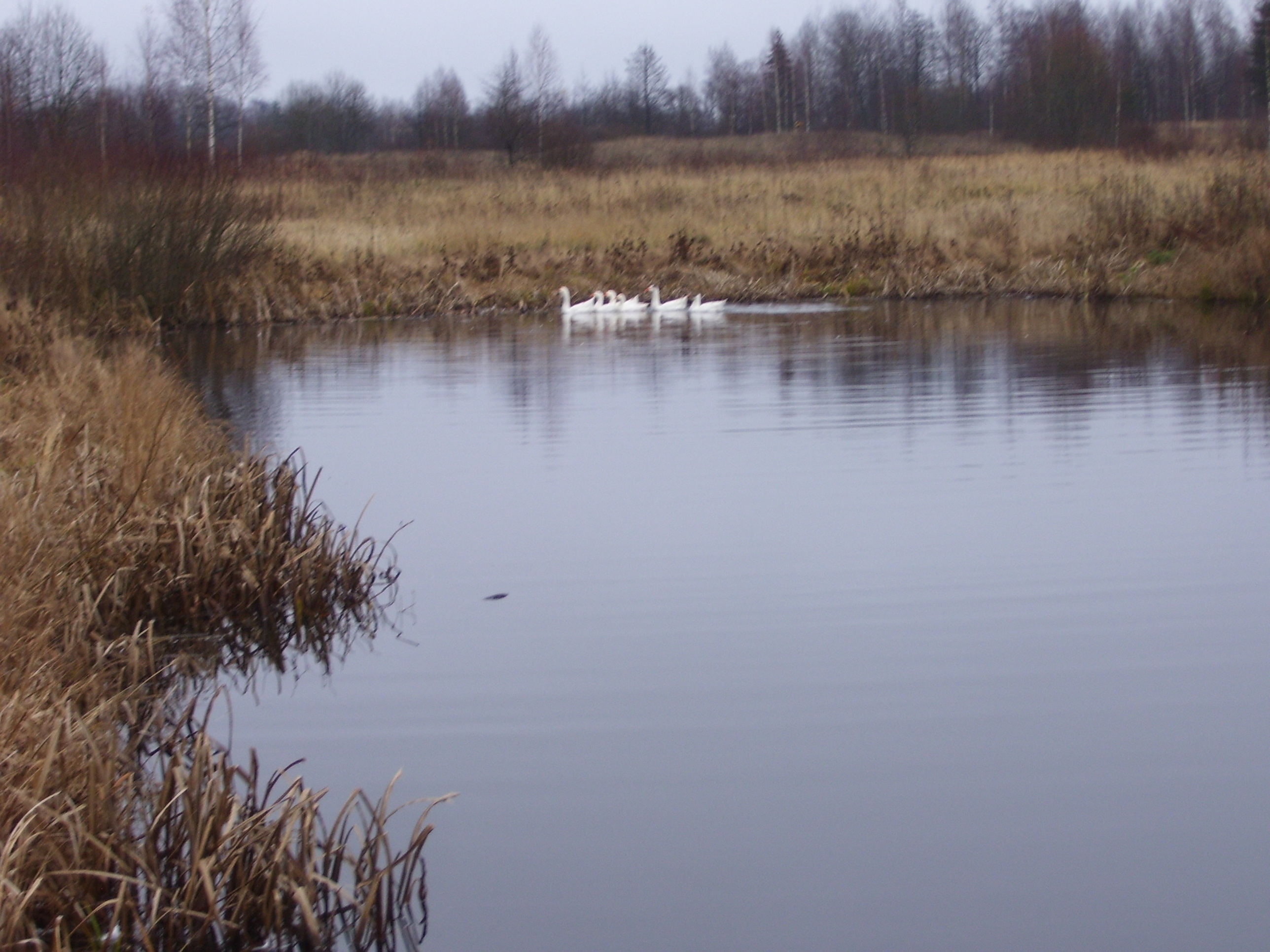 "Капанка" была вырыта для нужд животноводства